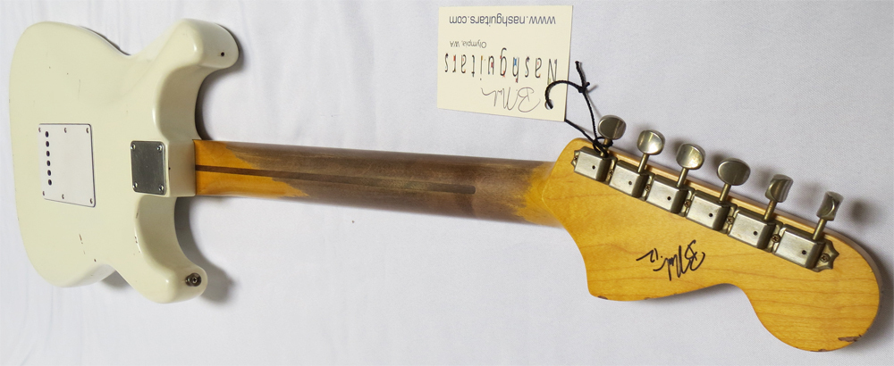 Mastil de una guitarra de Nash Guitars